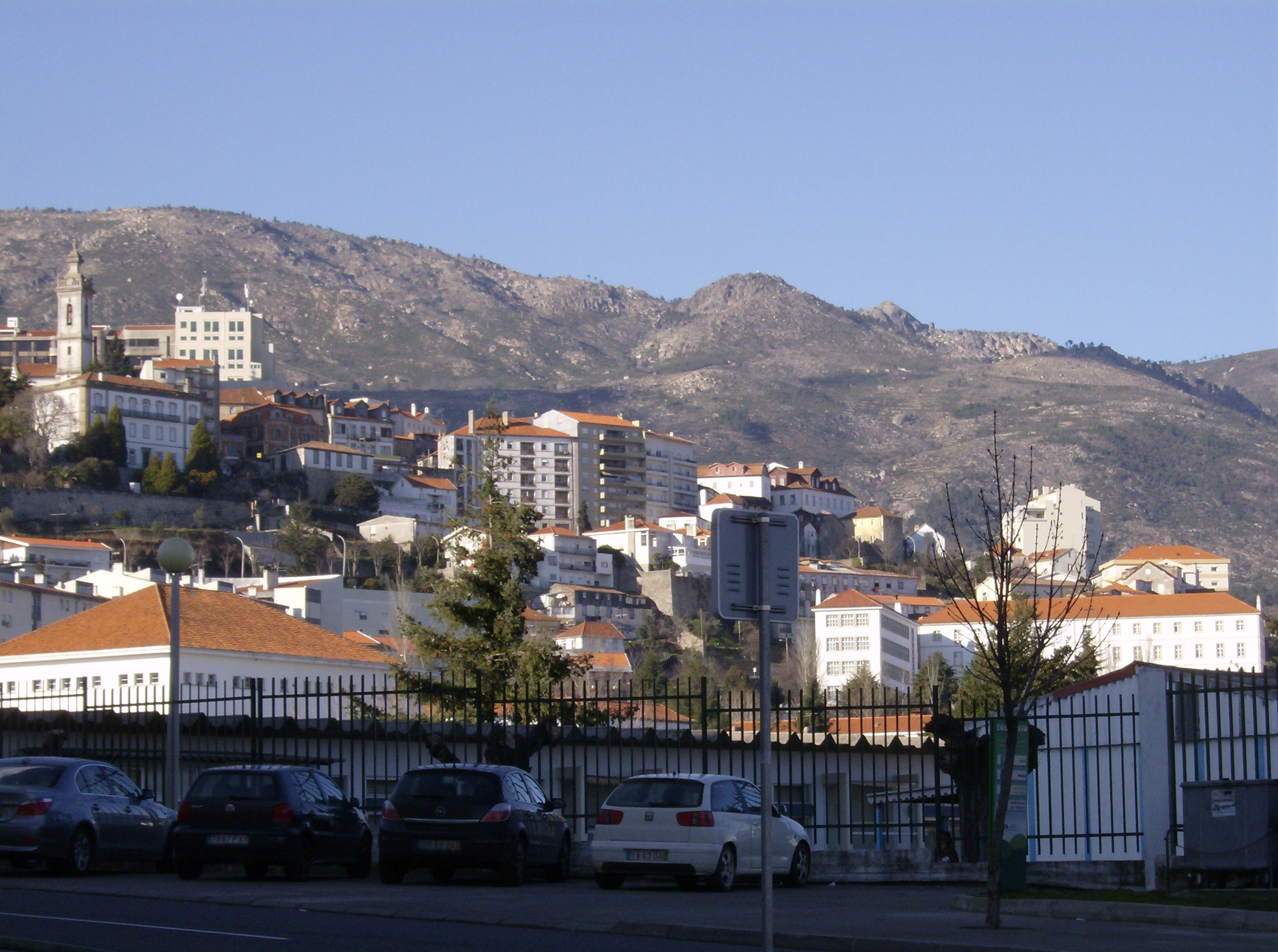 Covilhã, Portugal